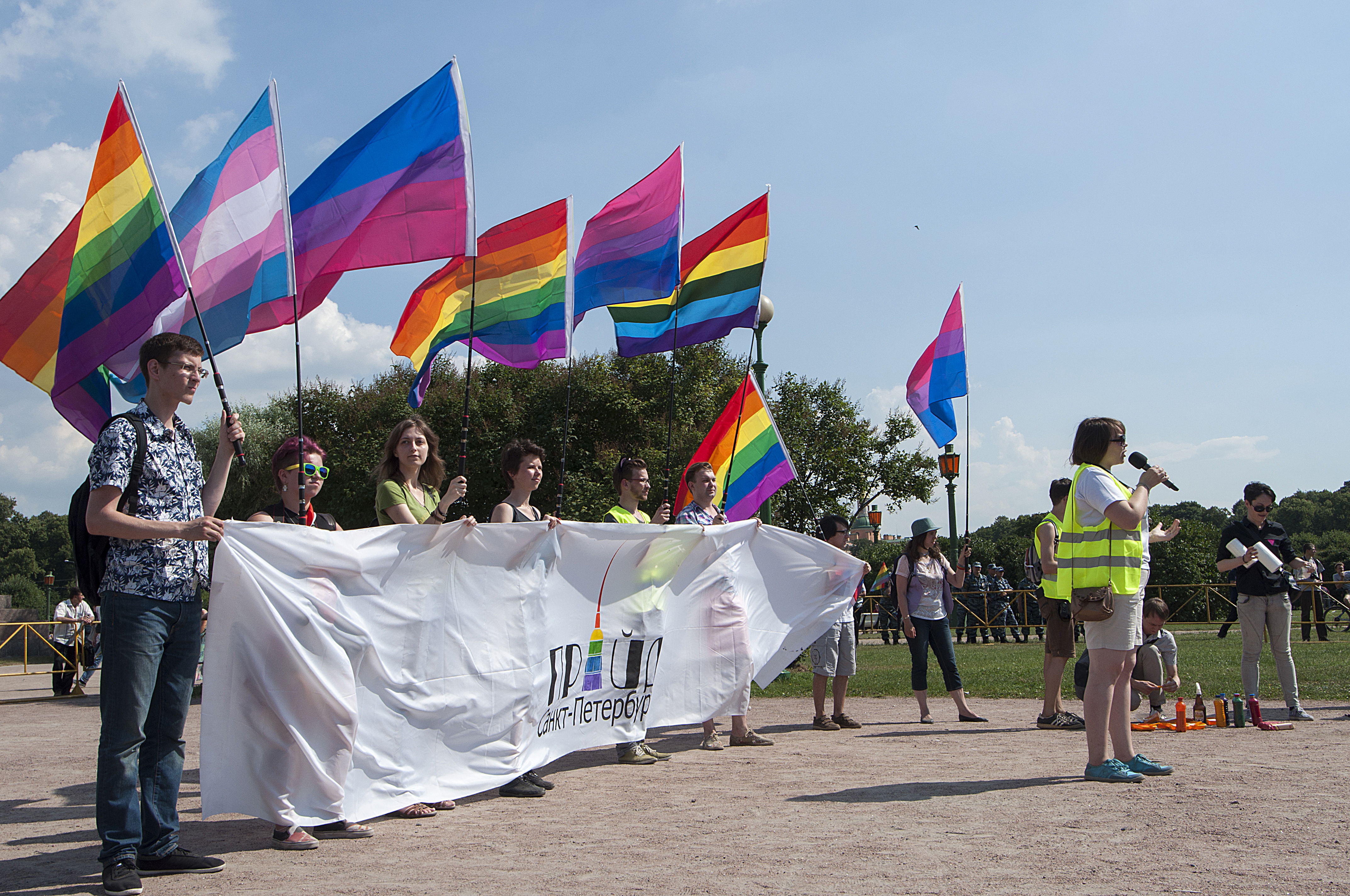 26/07/2014. Санкт-Петербург, Марсово поле. Публичная акция в рамках Пятого Санкт-Петербургского прайда. © Alek Naza